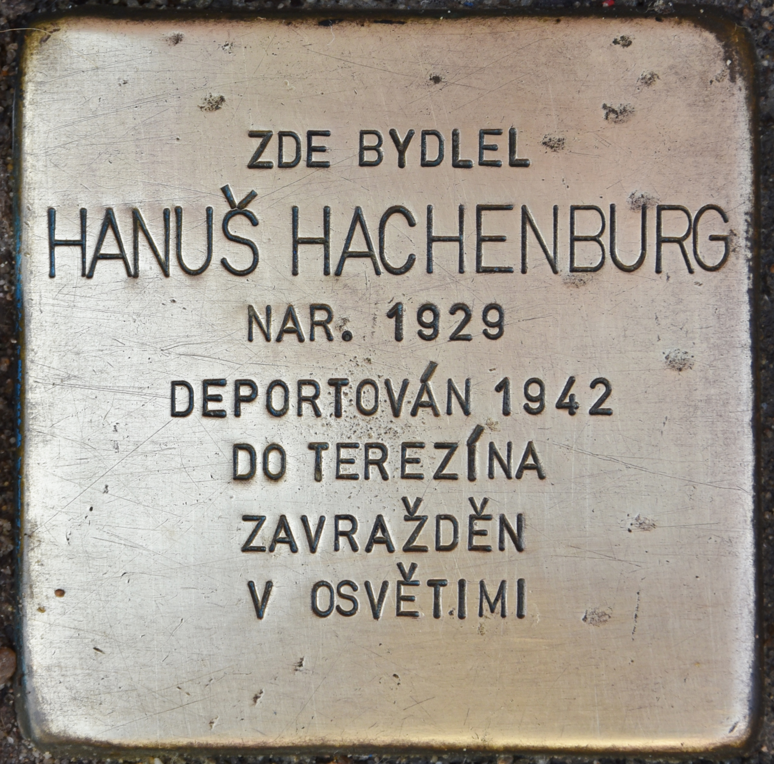 Stolperstein für Hanus Hachenburg